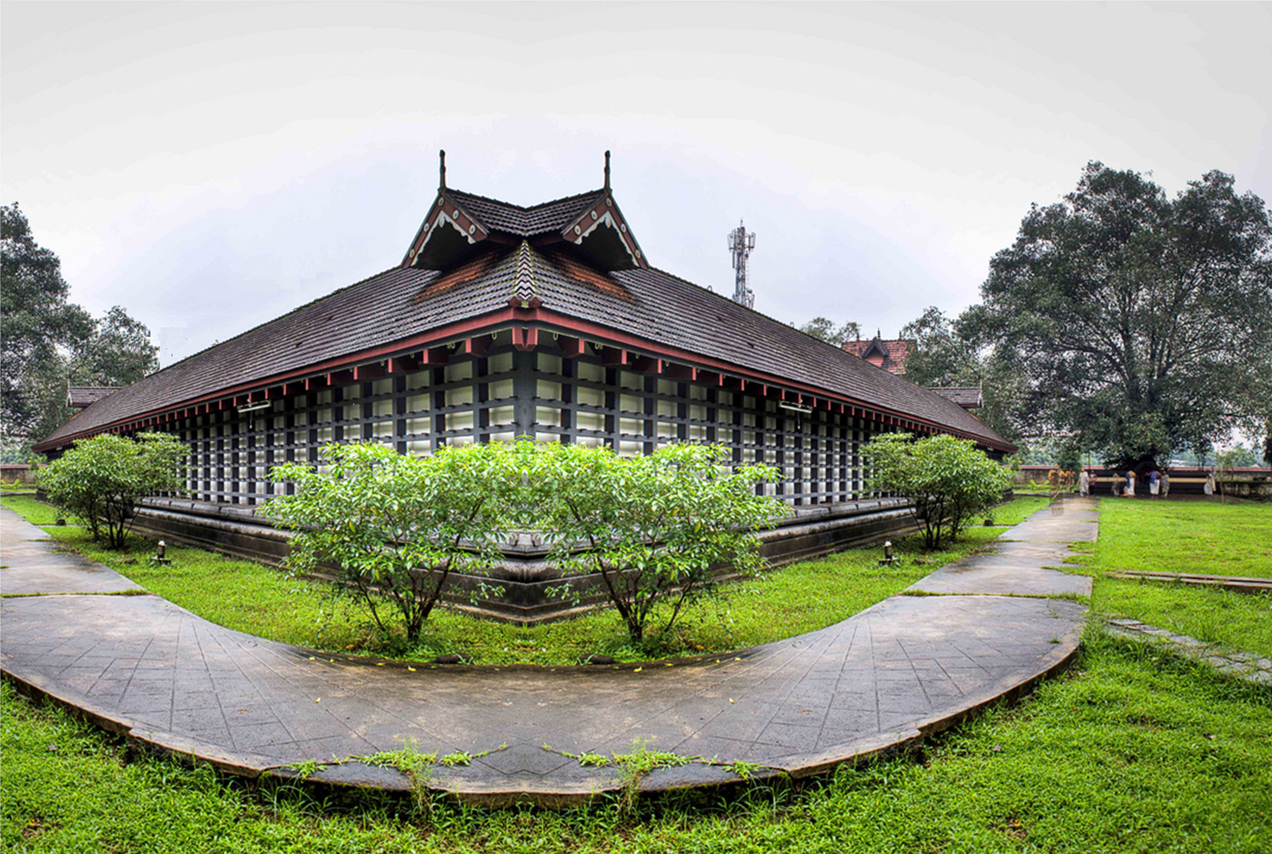 പൂങ്കുന്നം ശിവക്ഷേത്രം, തൃശ്ശൂർ